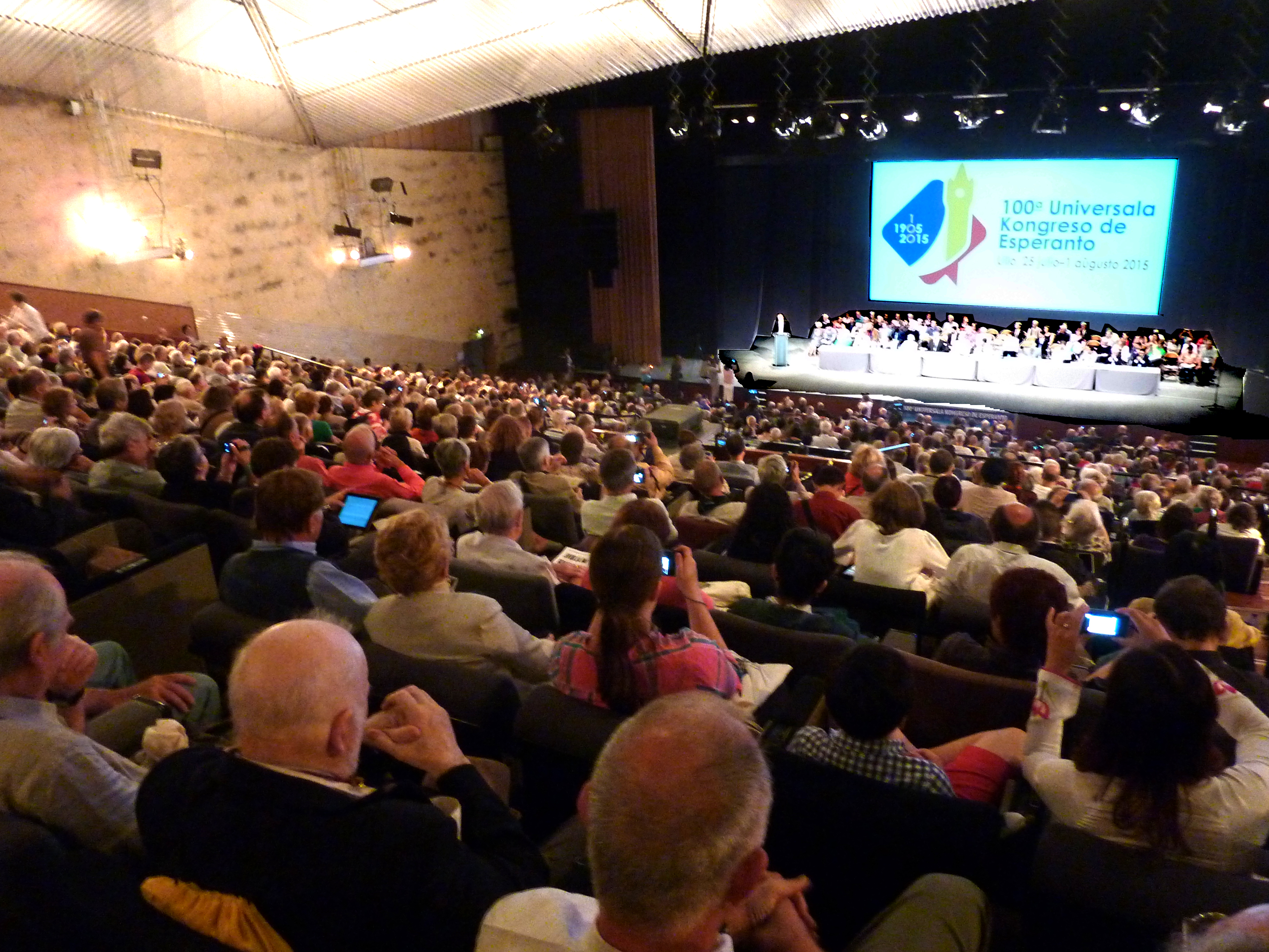 Solena malfermo de la 100-a Universala Kongreso de Esperanto en Lille (Francio)